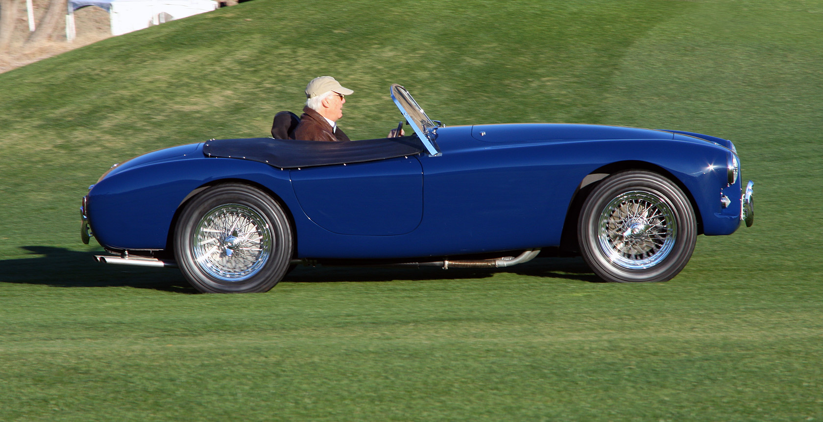 2011 Desert Classic, La Quinta, CA